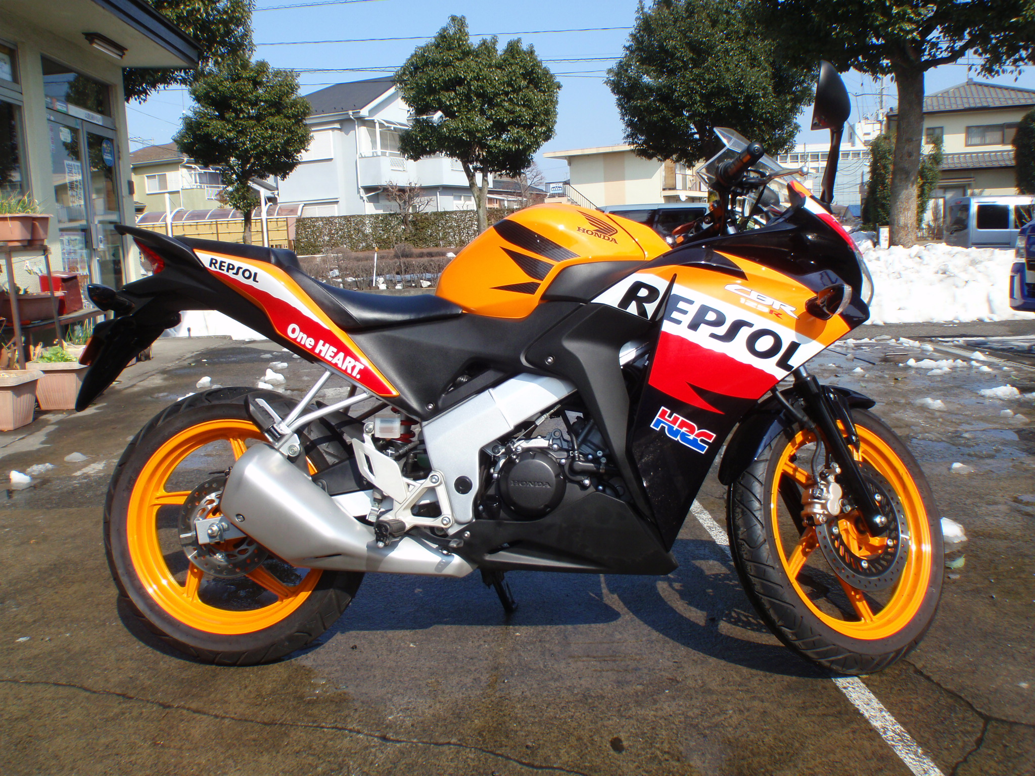 ユーロ仕様 レプソルカラー